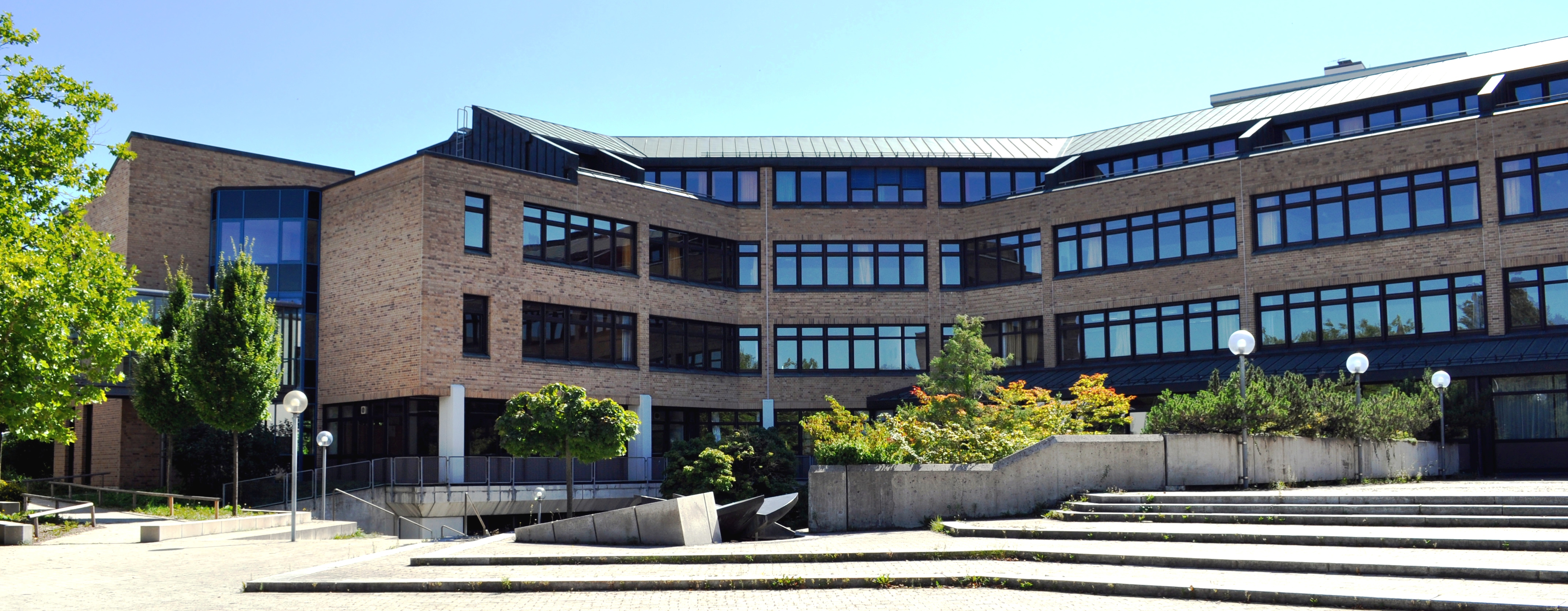 Gebäude des Lion-Feuchtwanger-Gymnasiums in München-Milbertshofen